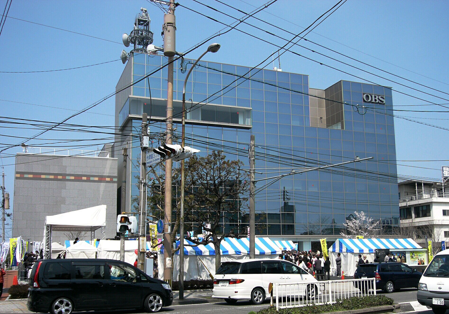 OBS大分放送の新社屋外観 大分市今都留国道１９７号線歩道